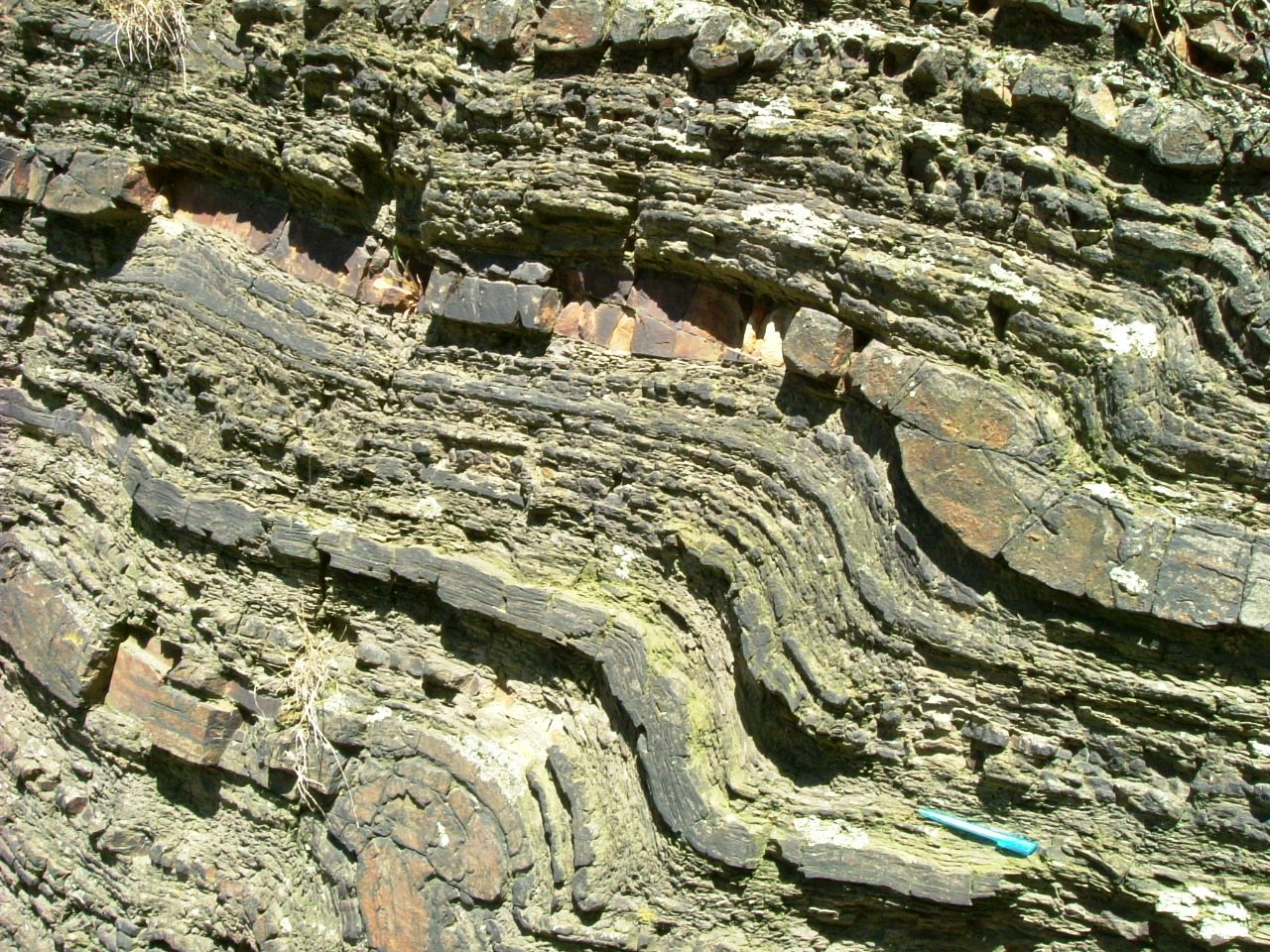 Geotop Adalbertfelsen in Aachen: Condrozsandsteine des Oberdevons (Famenne)